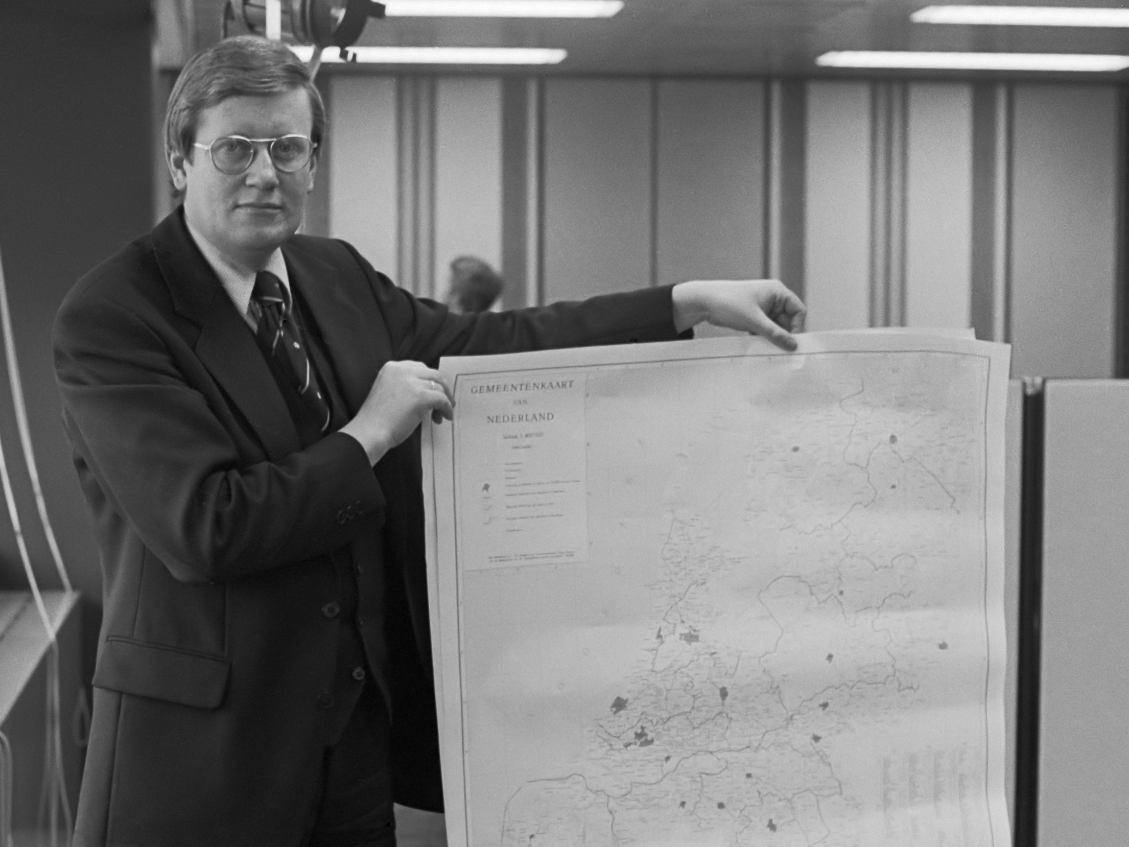 Minister Wiegel (BZ) presenteert bestuurlijke herindeling van ons land 25 mei 1978